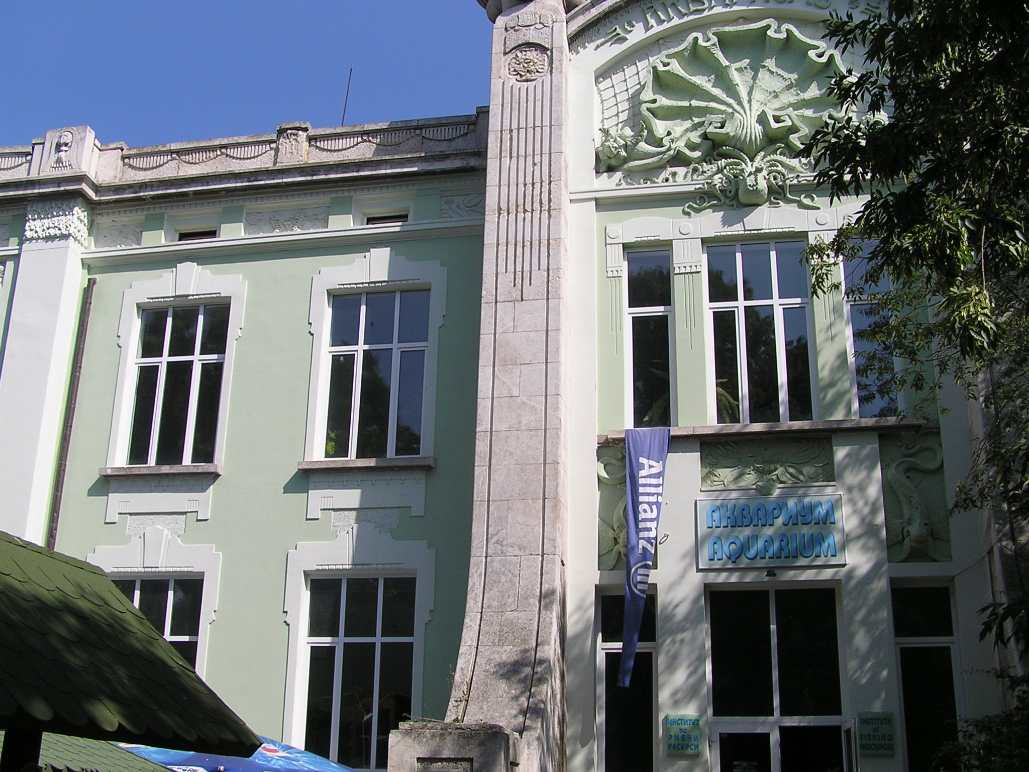 Aquarium Varna, Bulgaria